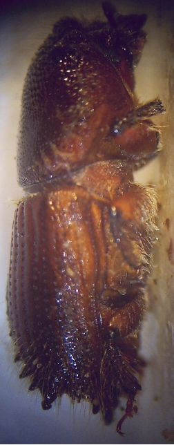 Ips_sexdentatus_20_fach_rechte_Seite_Imago